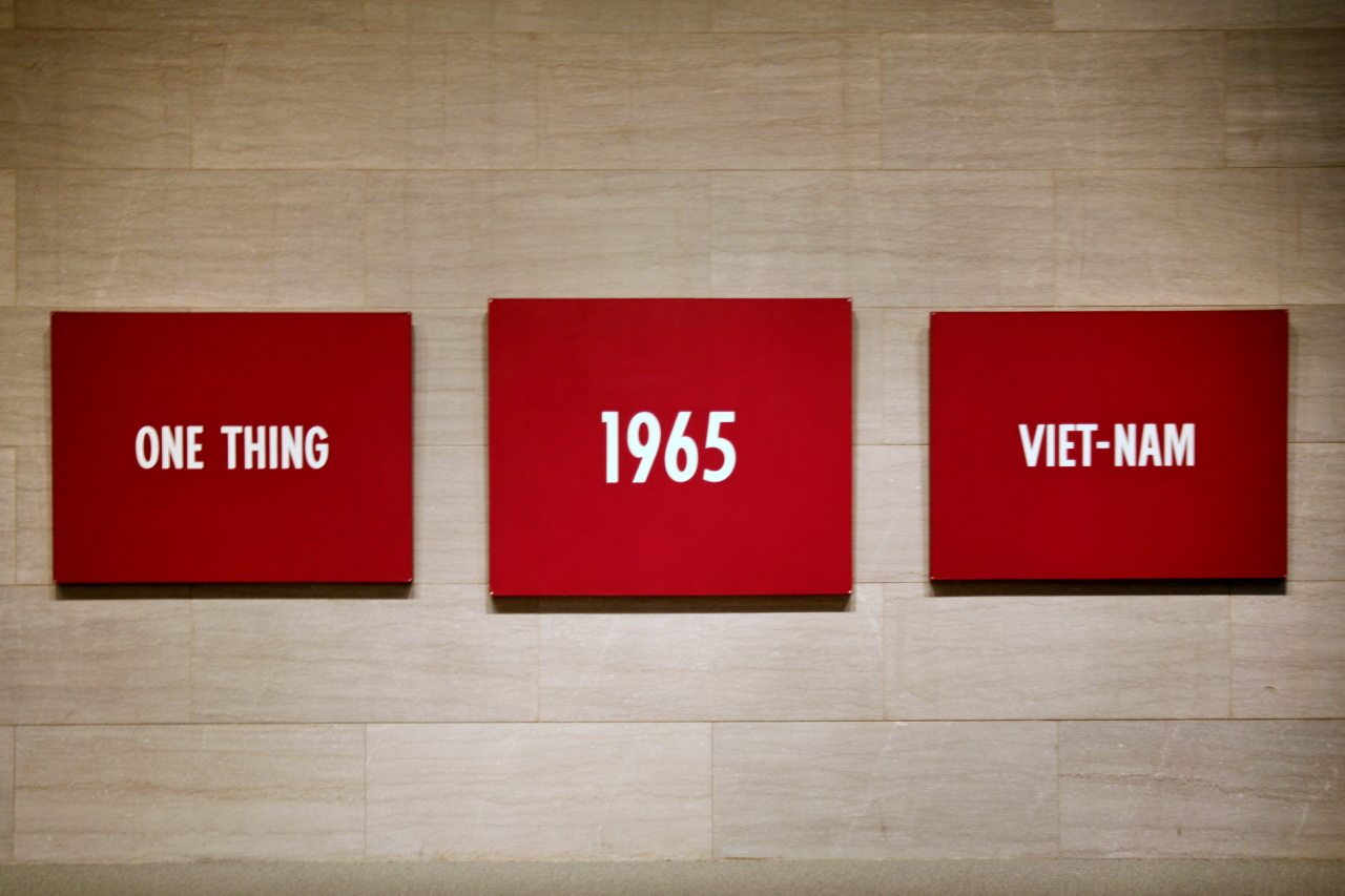 งานชื่อ Title ขององ คาวาระ